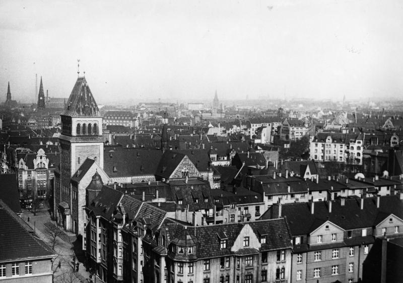 Bochum, Stadtansicht Bochum, Blick vom Knappschaftsgebäude, von Meinolphus Kirche 22.11.1939